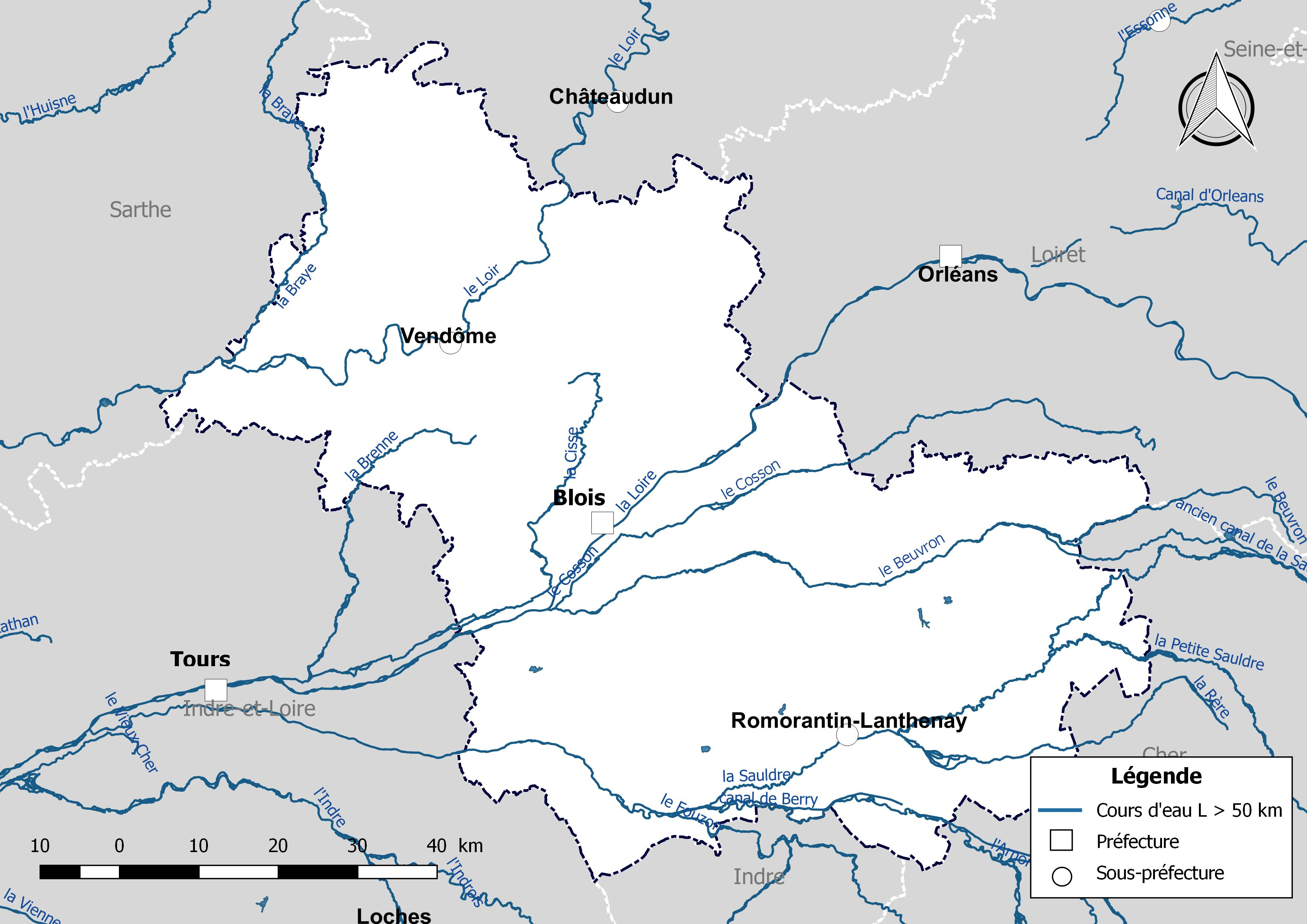 Carte des cours d'eau de longueur supérieure à 50 km drainant le département de Loir-et-Cher (France).